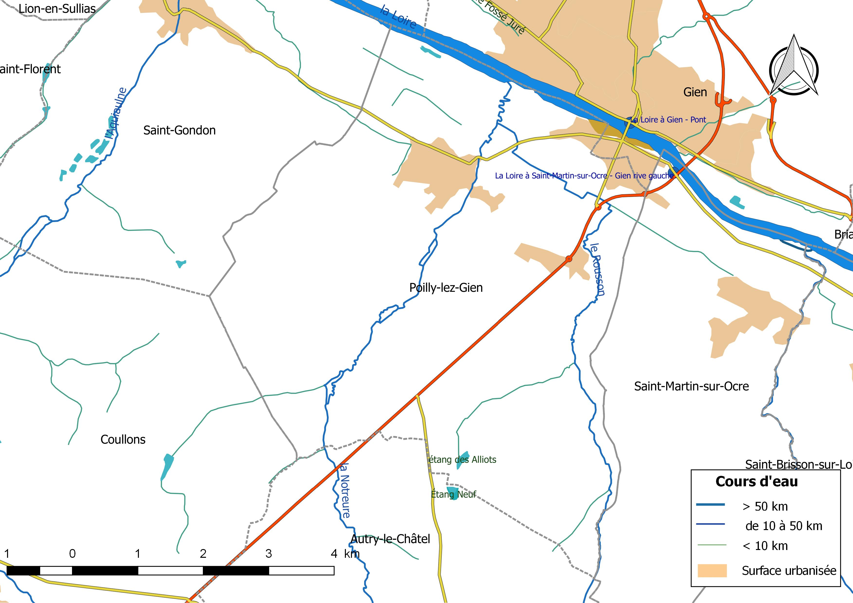 Carte du réseau hydrographique de la commune de Poilly-lez-Gien (France).